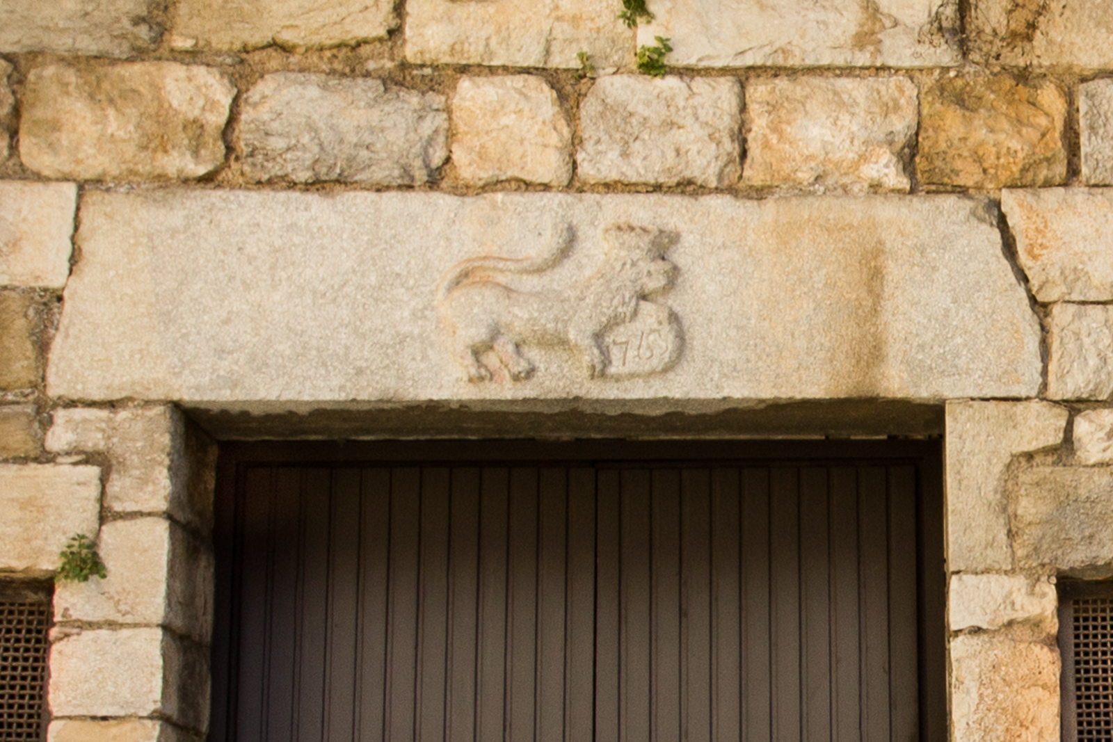 Dintel sobre una puerta de la fachada sur de San Nicolás de Girona.